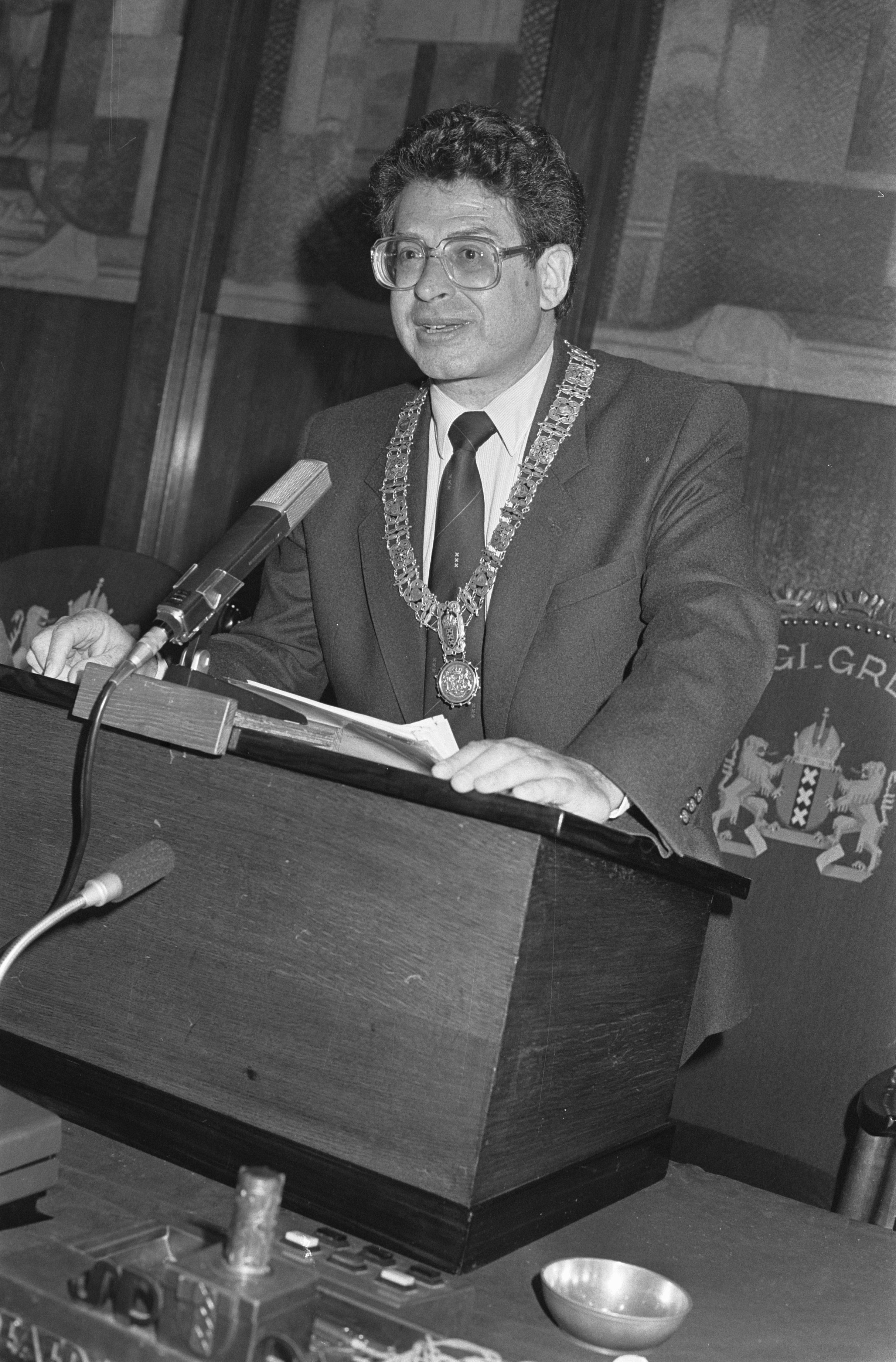 Collectie / Archief : Fotocollectie Anefo Reportage / Serie : Burgemeester Ed van Thijn geïnstalleerd als burgemeester van Amsterdam tijdens een zitting van de gemeenteraad Beschrijving : Dhr. Ed van Thijn met ambtsketen om tijdens een toespraak Datum : 16 juni 1983 Locatie : Amsterdam, Noord-Holland Trefwoorden : ambtsaanvaardingen, burgemeesters, toespraken Persoonsnaam : Thijn, Ed van Fotograaf : Bogaerts, Rob / Anefo Auteursrechthebbende : Nationaal Archief Materiaalsoort : Negatief (zwart/wit) Nummer archiefinventaris : bekijk toegang 2.24.01.05 Bestanddeelnummer : 932-6236